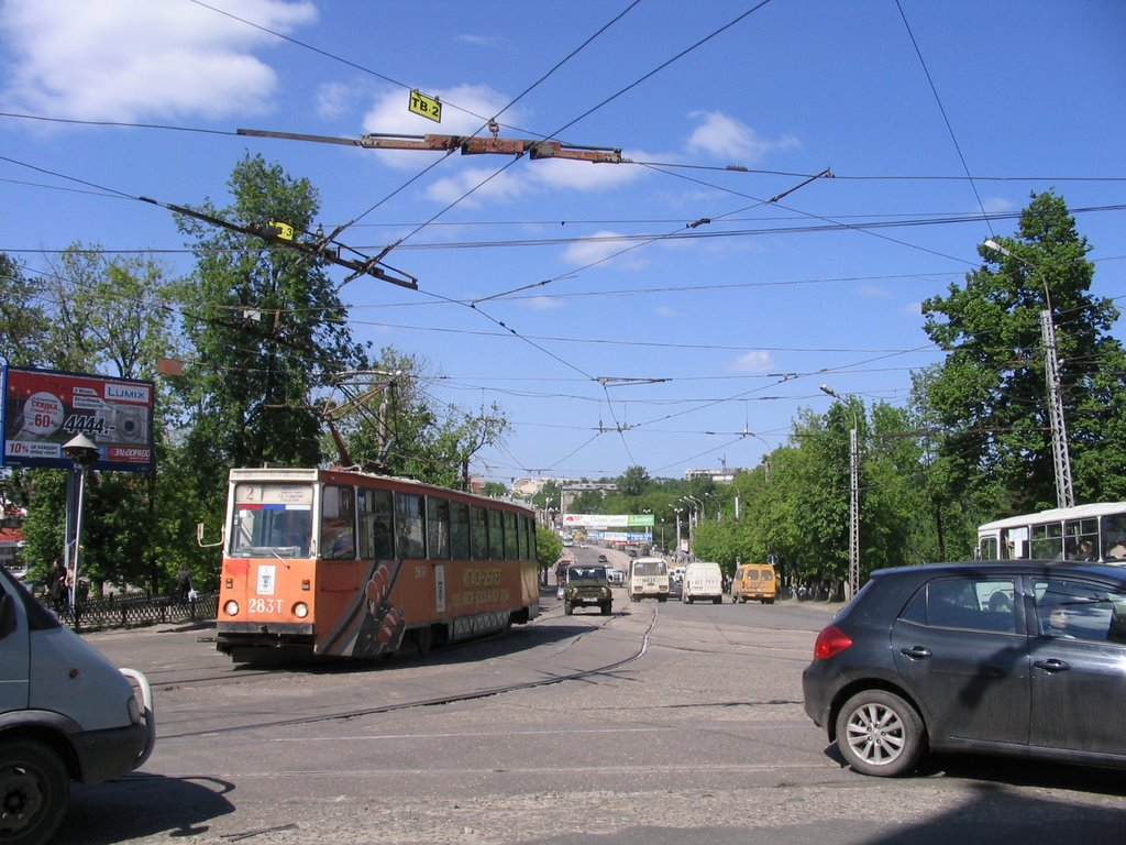 Перекресток у Почтамта